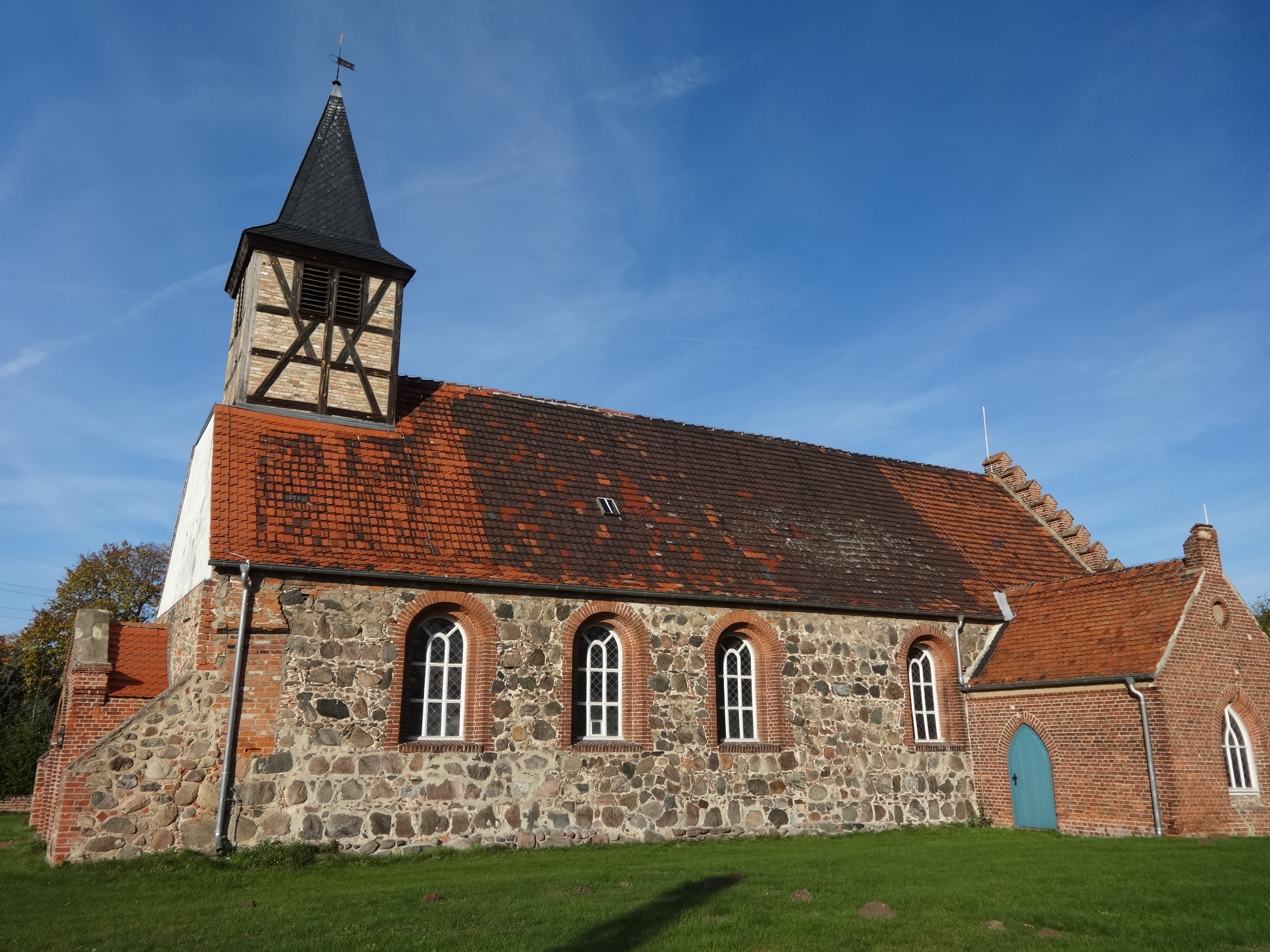 Das Bauwerk entstand in den Jahren 1184 bis 1194 als feudaler Profanbau mit einer Kapelle und wurde erst im 15. Jahrhundert zur Kirche gewidmet. Er ist aus Feldstein errichtet, während der Anbau sowie die Sakristei aus dem 19. Jahrhundert mit Mauerziegeln ausgeführt wurden, die sich deutlich von dem übrigen Baukörper absetzen. Der Fachwerkturm entstand um 1700. Im Innern befinden sich ein Altar aus dem Jahr 1648, eine Kanzel aus 1679 sowie ein Opferstock aus dem 16. Jahrhundert.